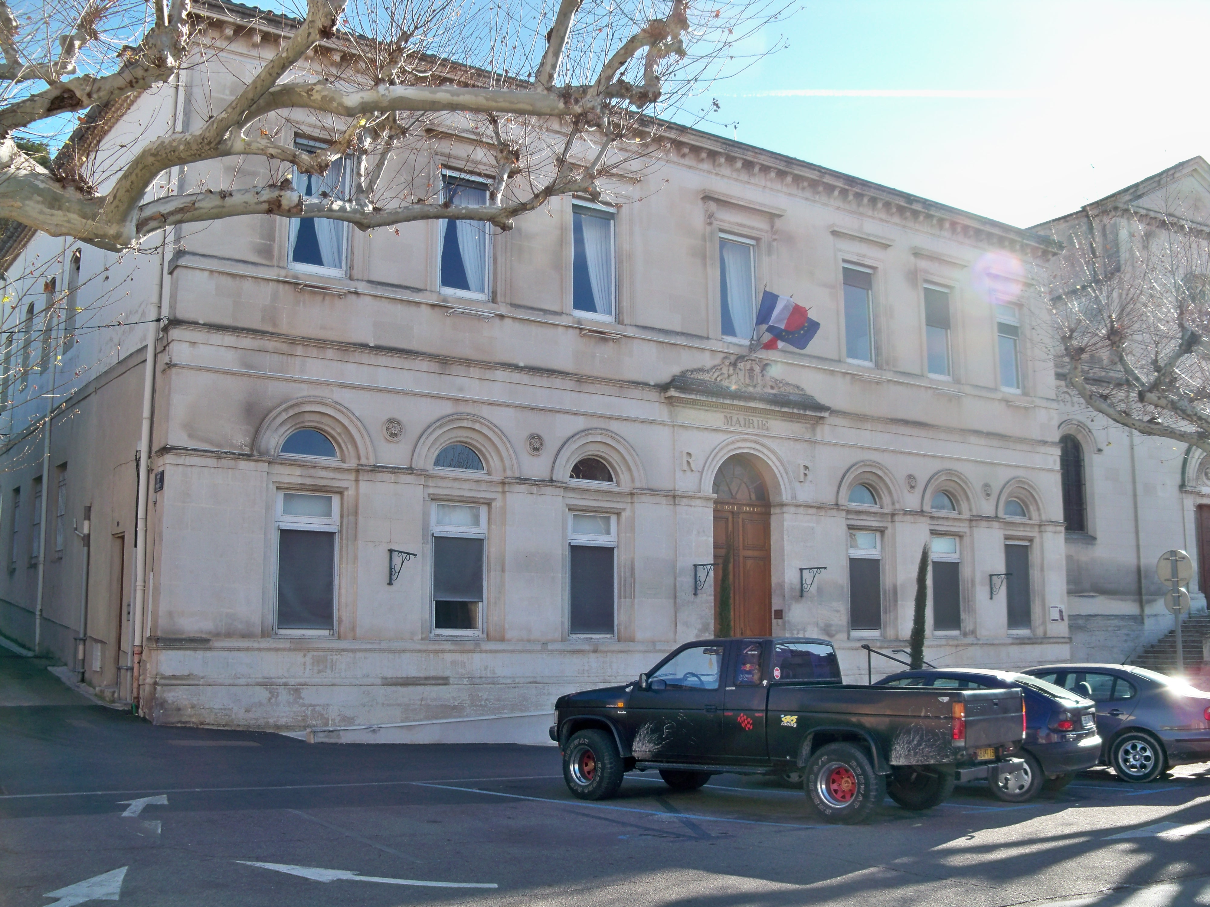 Mairie de Châteaurenard (Bouches-du-Rhône, France)